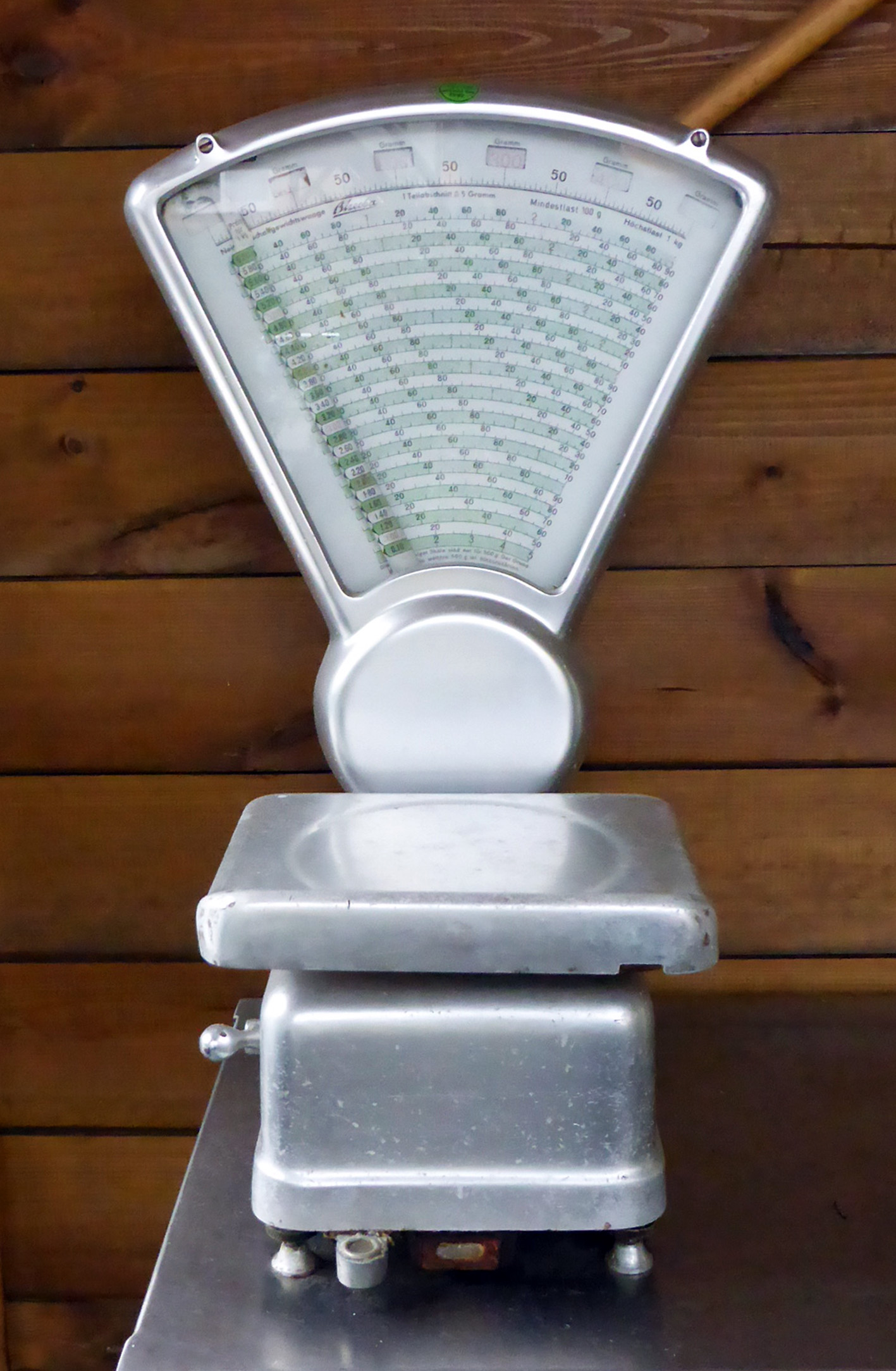 Bizerba Waage im Hotel Lenz, Fulda.